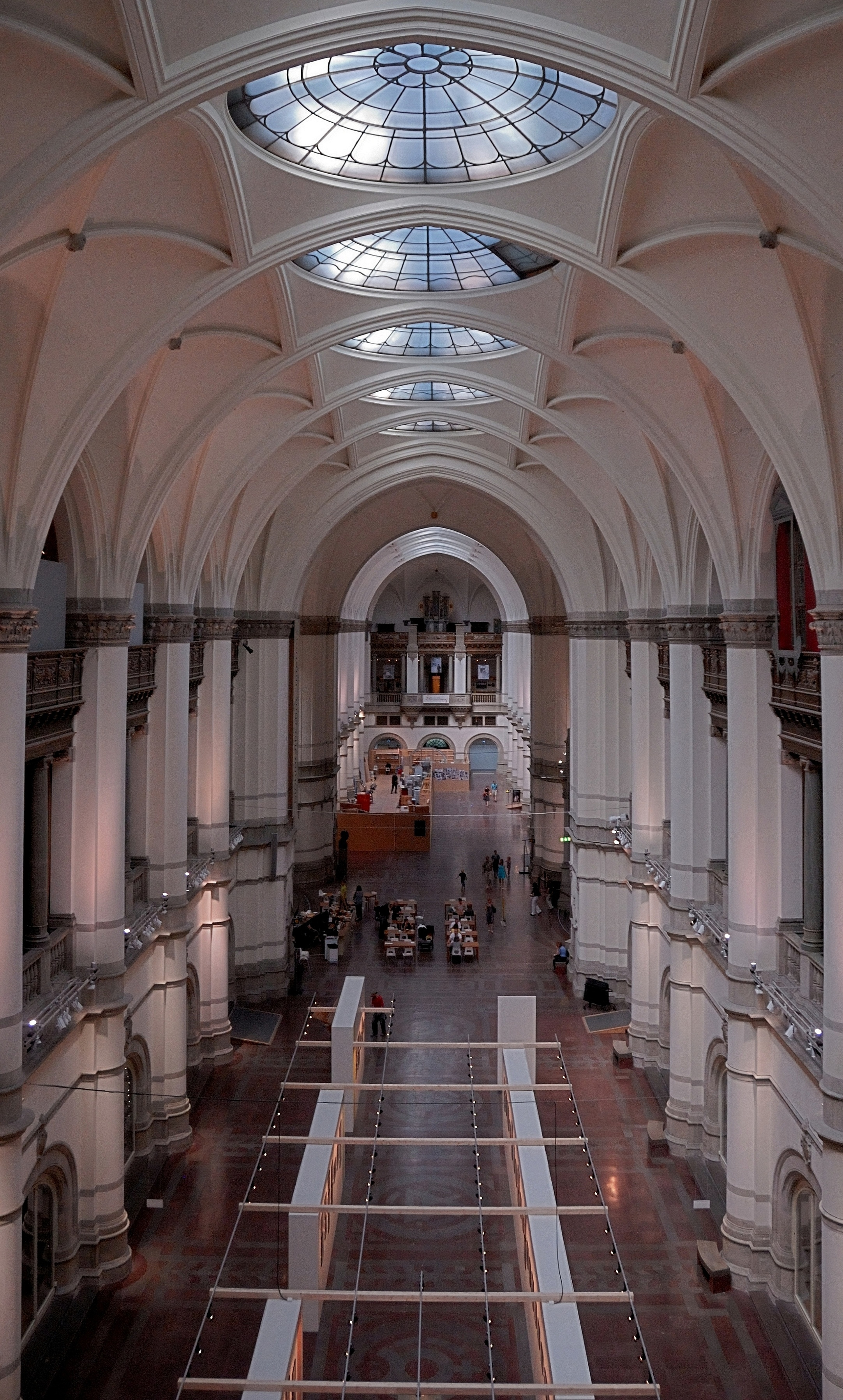 Nordiska museet (Djurgården 1:1)